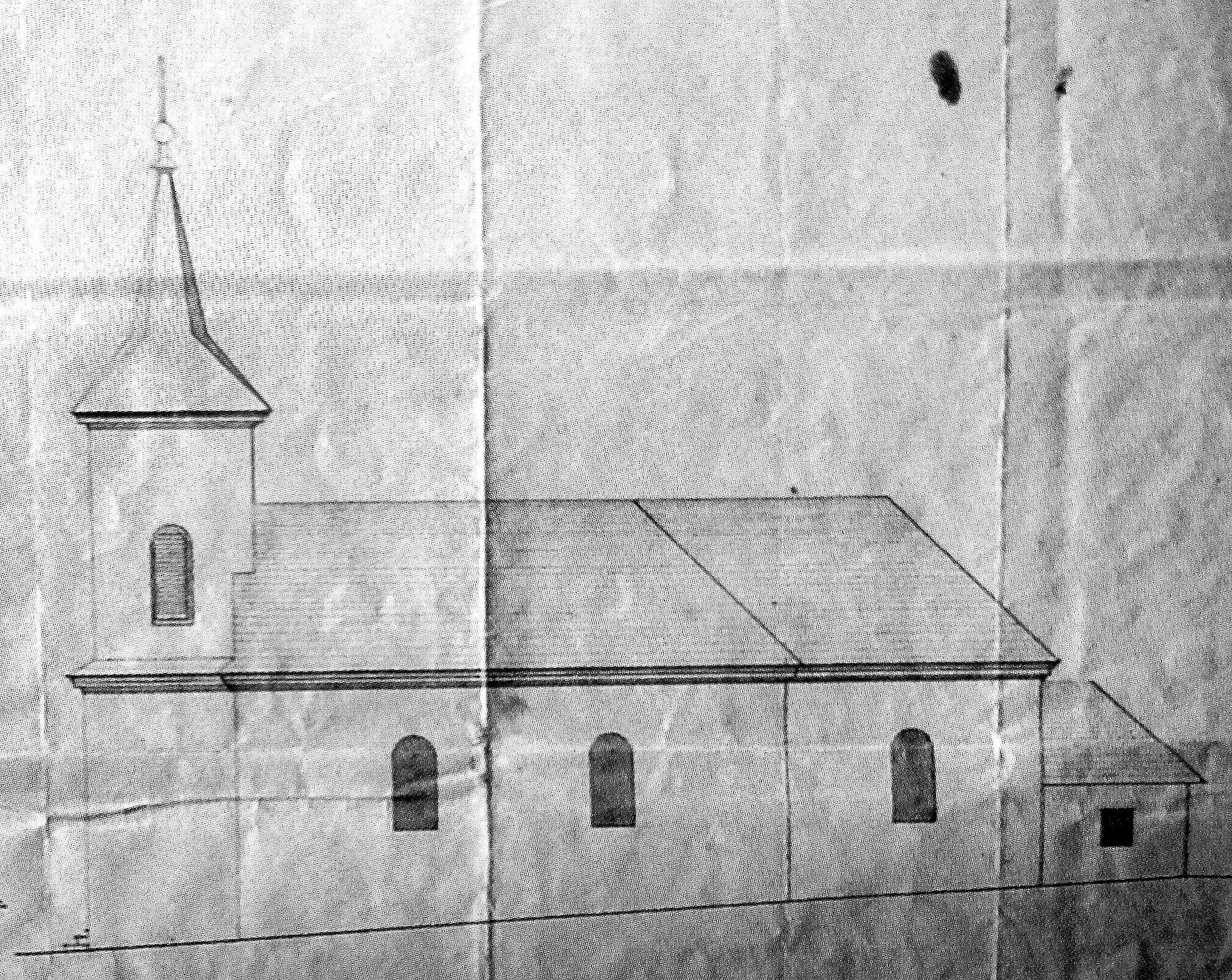 Nákres nového kostola z roku 1858, pohľad z juhu. Kostol postavili podľa plánu Martina Rotha, lebo poskytol najlacnejší návrh, podľa ktorého náklady na výstavbu tvorili 3 500 florénov. (Poznámka: Do konca roku 1891 sa v Rakúsko-Uhorsku používal ako mena zlatý (zlatník, zlatka, gulden, florén). Potom platila ako mena „koruna“, ktorá vychádzala zo zlatého v pomere 1 zlatý = 2 koruny.) Nový kostol začali stavať na jar roku 1858. V januári 1859 už bol kostol po stavebnej stránke dokončený. Oltár a katedru postavil prešovský sochár Gustáv Zempliner. Obrazy v kostole a to obraz Najsvätejšej Trojice a obraz Premenenia Pána namaľoval maliar Jozef Gaľavský zo Solivara. 7. augusta 1859 bol kostol slávnostne benediktovaný.